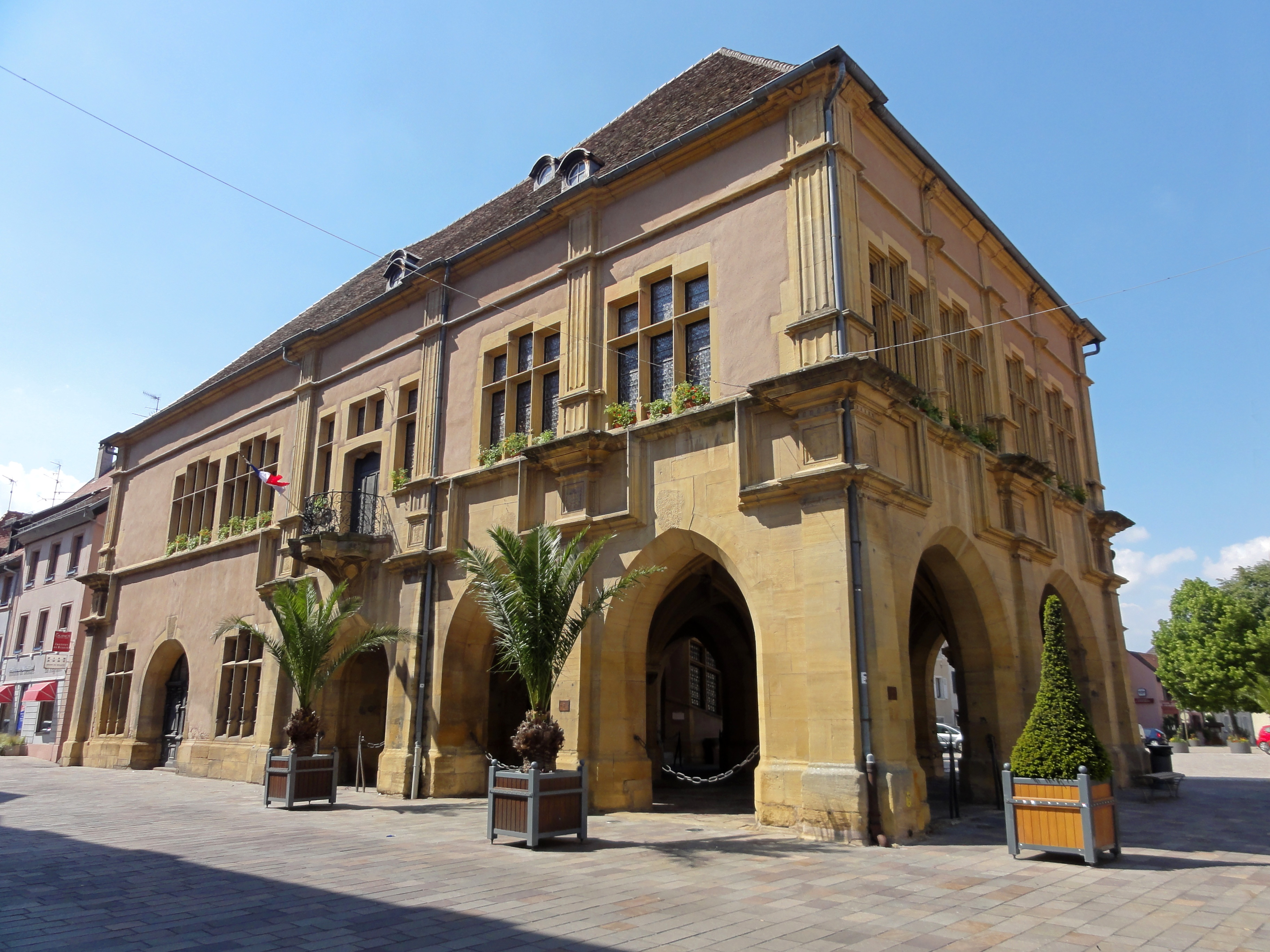 Alsace, Haut-Rhin, Ensisheim, Palais de la Régence Habsbourg (1535), rue de la Première-Armée-Française. It is indexed in the Base Mérimée, a database of architectural heritage maintained by the French Ministry of Culture, under the references PA00085421 and IA00074214.